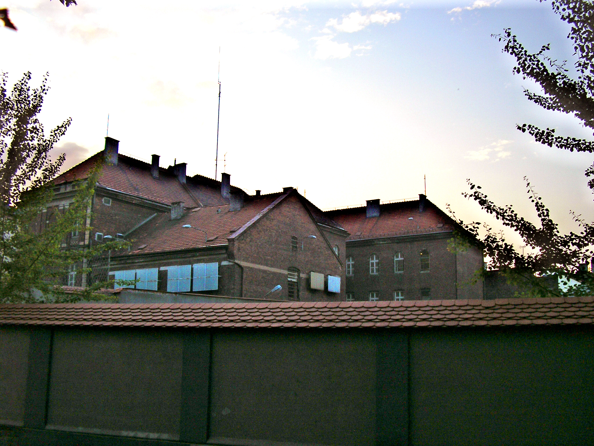 Areszt śledczy. Kraków, ul. Czarnieckiego 3.